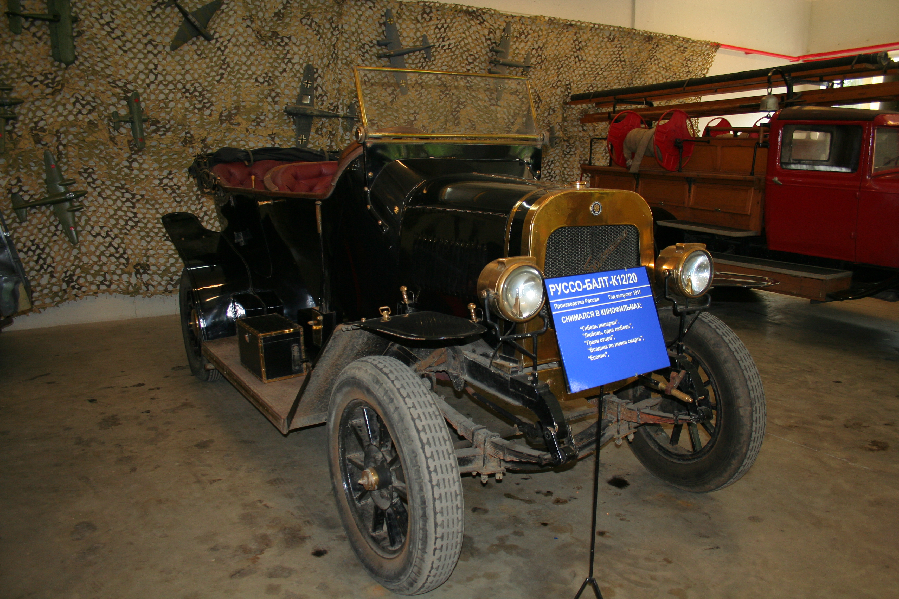 Museum auf dem Gelände des Filmstudios Mosfilm in Moskau. Die Exposition. Ein Russo-Balt K12/20, Baujahr 1911.